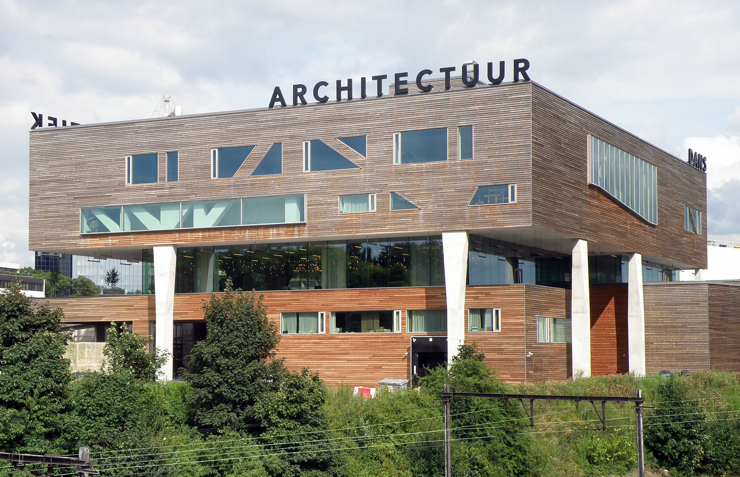 Antwerpen (België). Kunstencentrum DeSingel, aan de Singel (officieel: Desguinlei nr.25) te Antwerpen. Gebouw n.o.v. archit. Stéphane Beel (anno 2007).